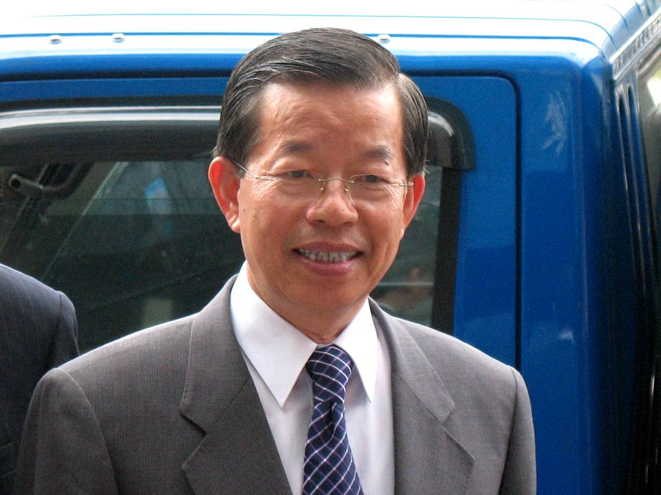 台灣民進黨前主席謝長廷。